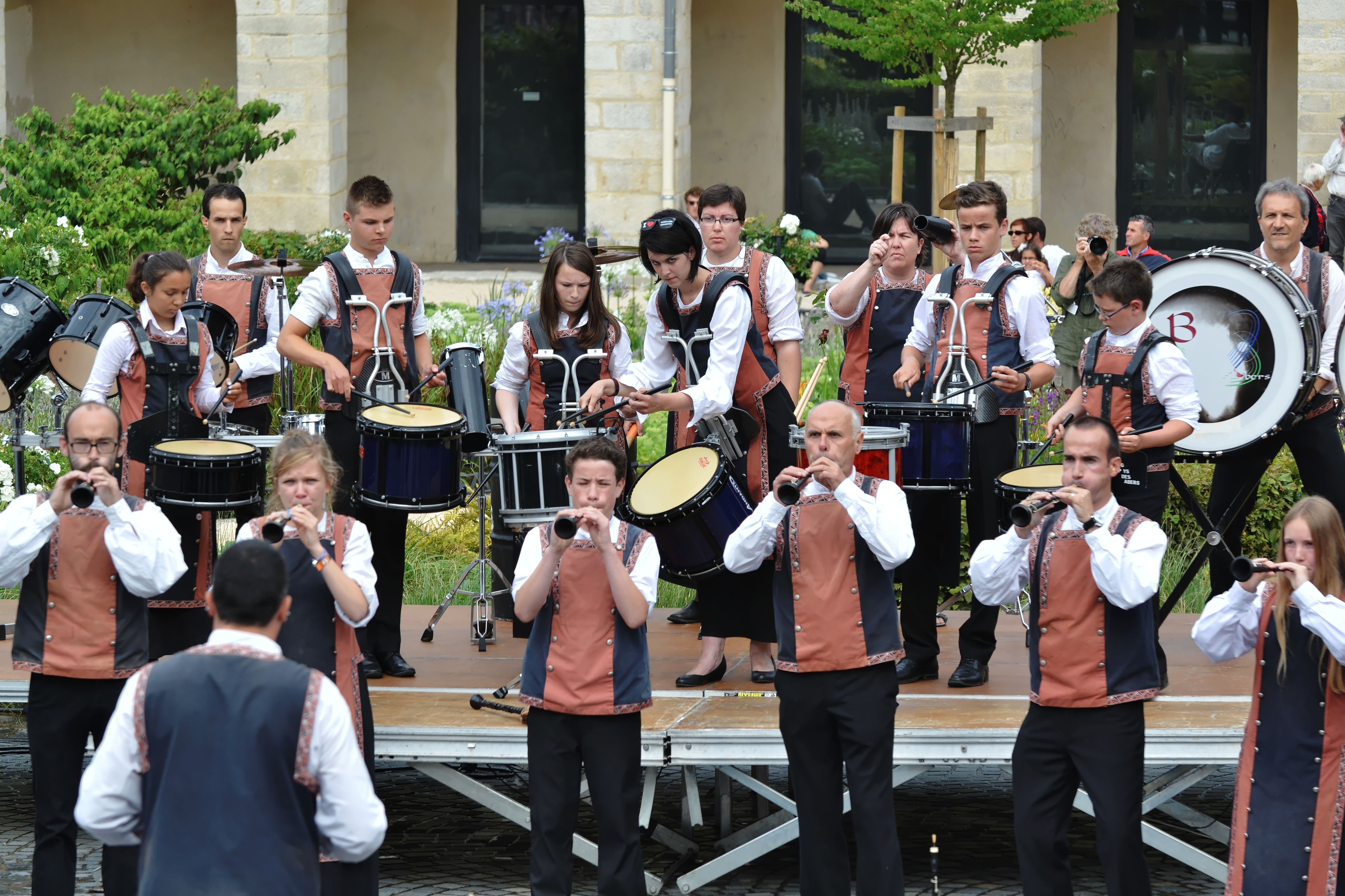 Le Bagad Pays des Abers (Bro An Aberioù) lors du championnat national des bagadoù (troisième catégorie) au Festival de Cornouaille, Esplanade François Mitterrand à Quimper, le 27 juillet 2013.